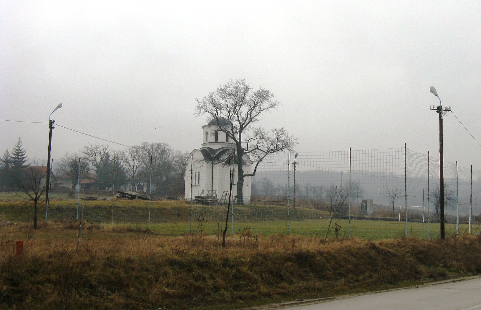 Црква у Мачковцу, Куршумлија